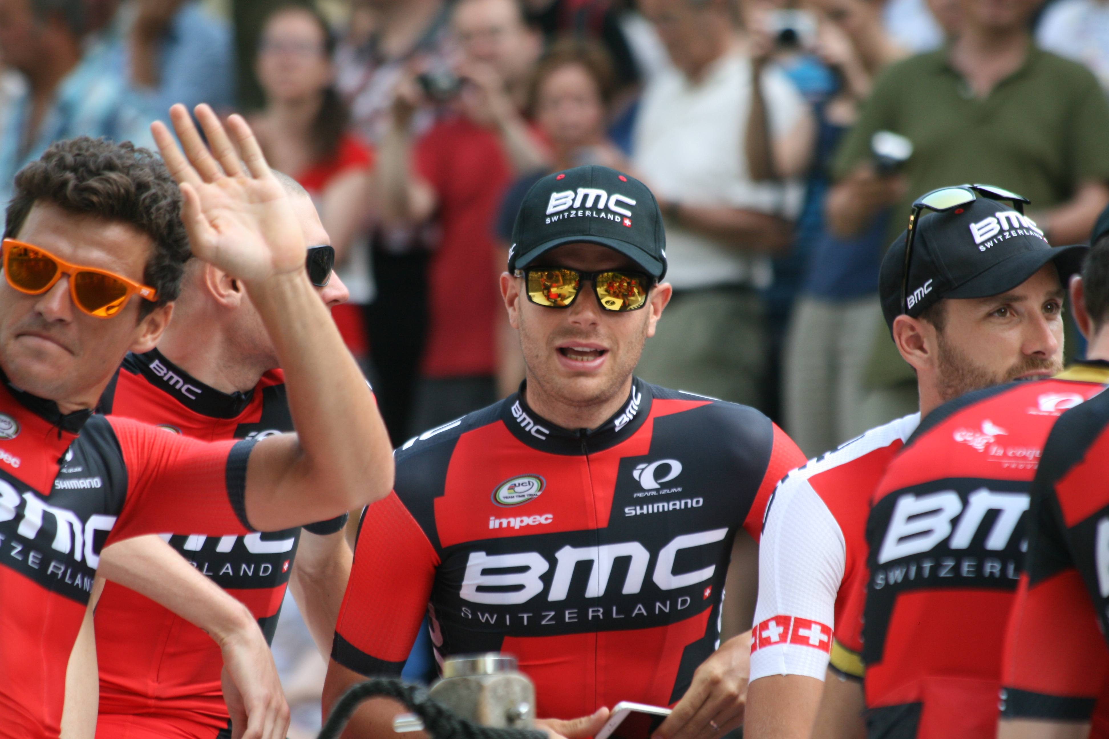 ploegenpresentatie Tour de France 2015 Utrecht